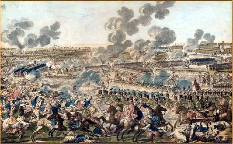 Римницька битва